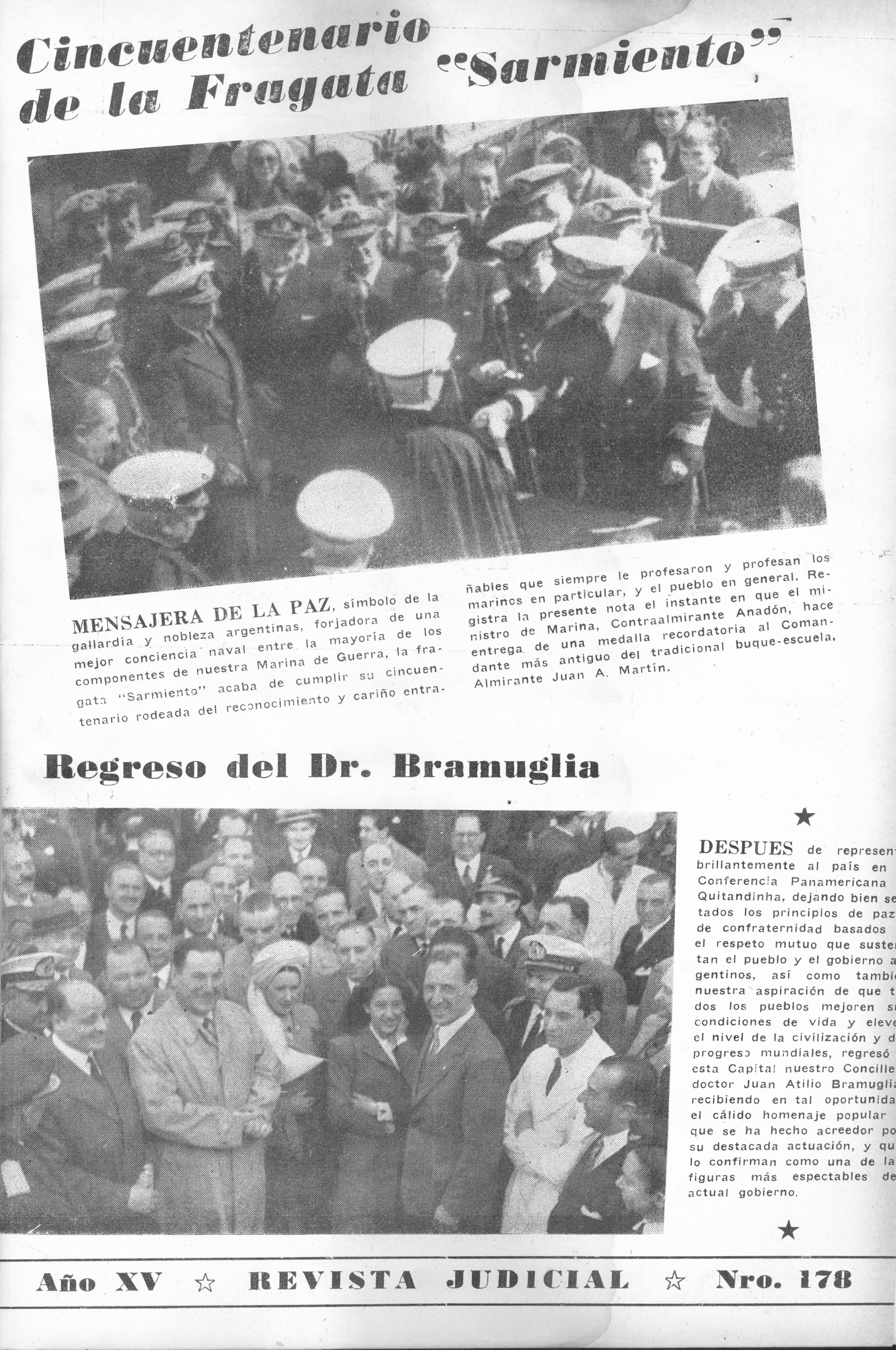 Revista Judicial nº177: "Cincuentenario de la Fragata Sarmiento".